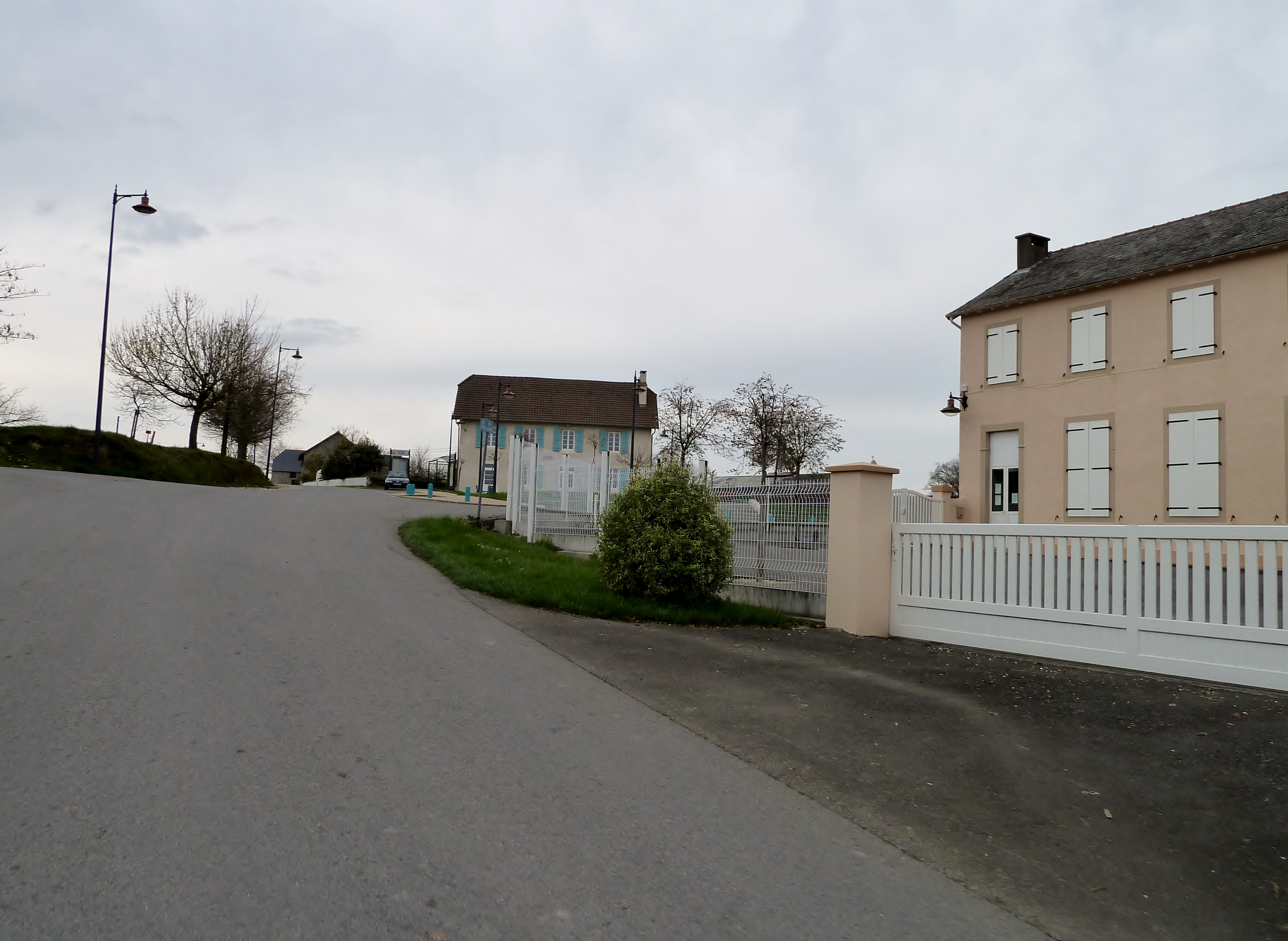 Centre de Miossens-Lanusse